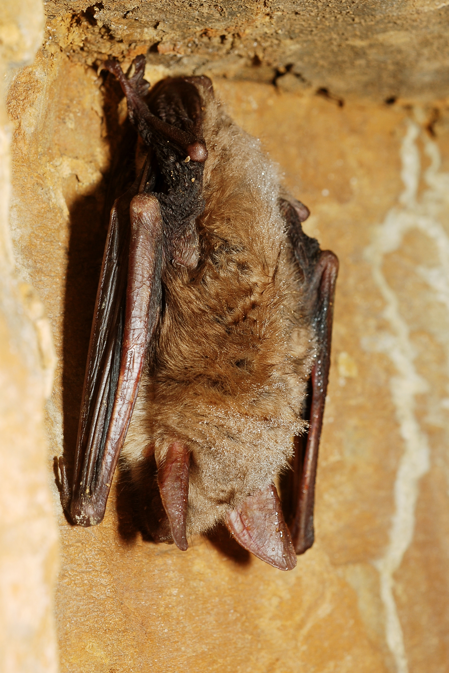 Myotis myotis